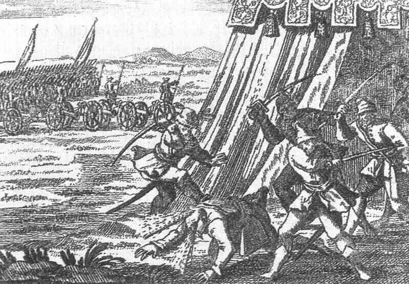 A Turóc megyei követek lekaszabolása az ónodi országgyűlésen - rézmetszet